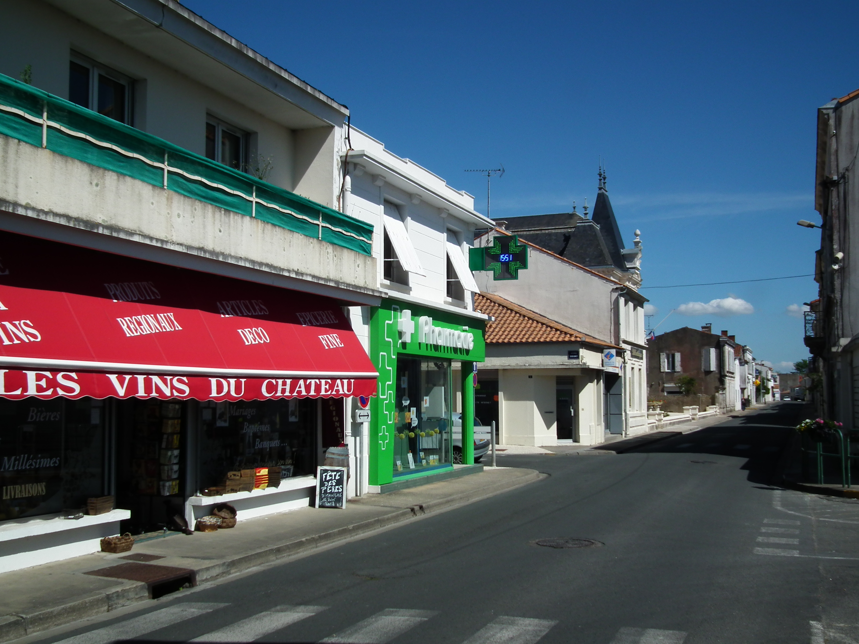 Rue Charles-Hervé à Etaules